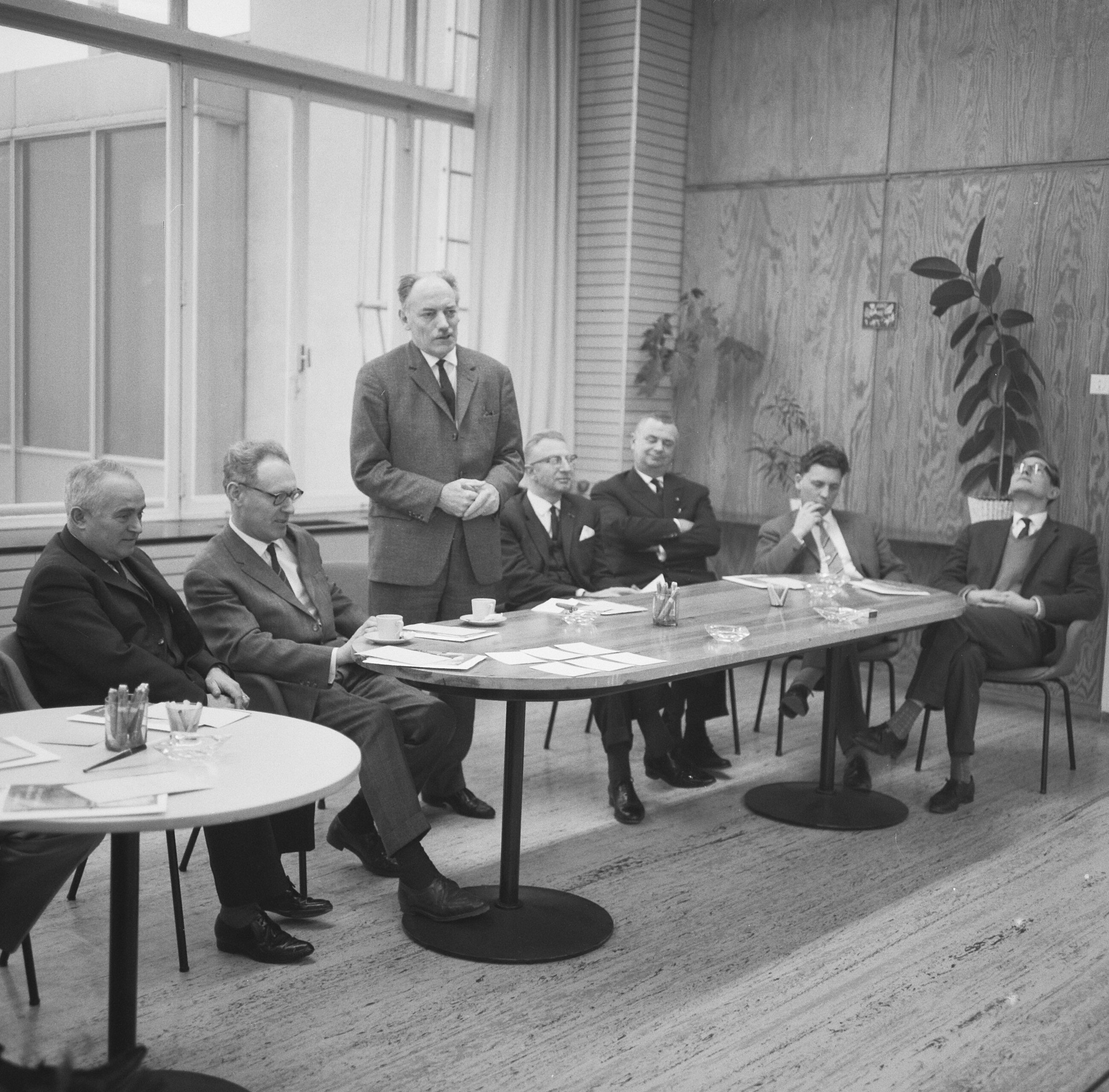 Collectie / Archief : Fotocollectie Anefo Reportage / Serie : [ onbekend ] Beschrijving : De GAK-zeskamp te Amsterdam. Flohr, Botwinnik, Goos van het Hull , Bouwmeester en Kuypers. Staand Henk van Steenis. Datum : 11 december 1963 Locatie : Amsterdam, Noord-Holland Trefwoorden : SCHAKEN Fotograaf : Broers, F.N. / Anefo Auteursrechthebbende : Nationaal Archief Materiaalsoort : Negatief (zwart/wit) Nummer archiefinventaris : bekijk toegang 2.24.01.03 Bestanddeelnummer : 915-8361